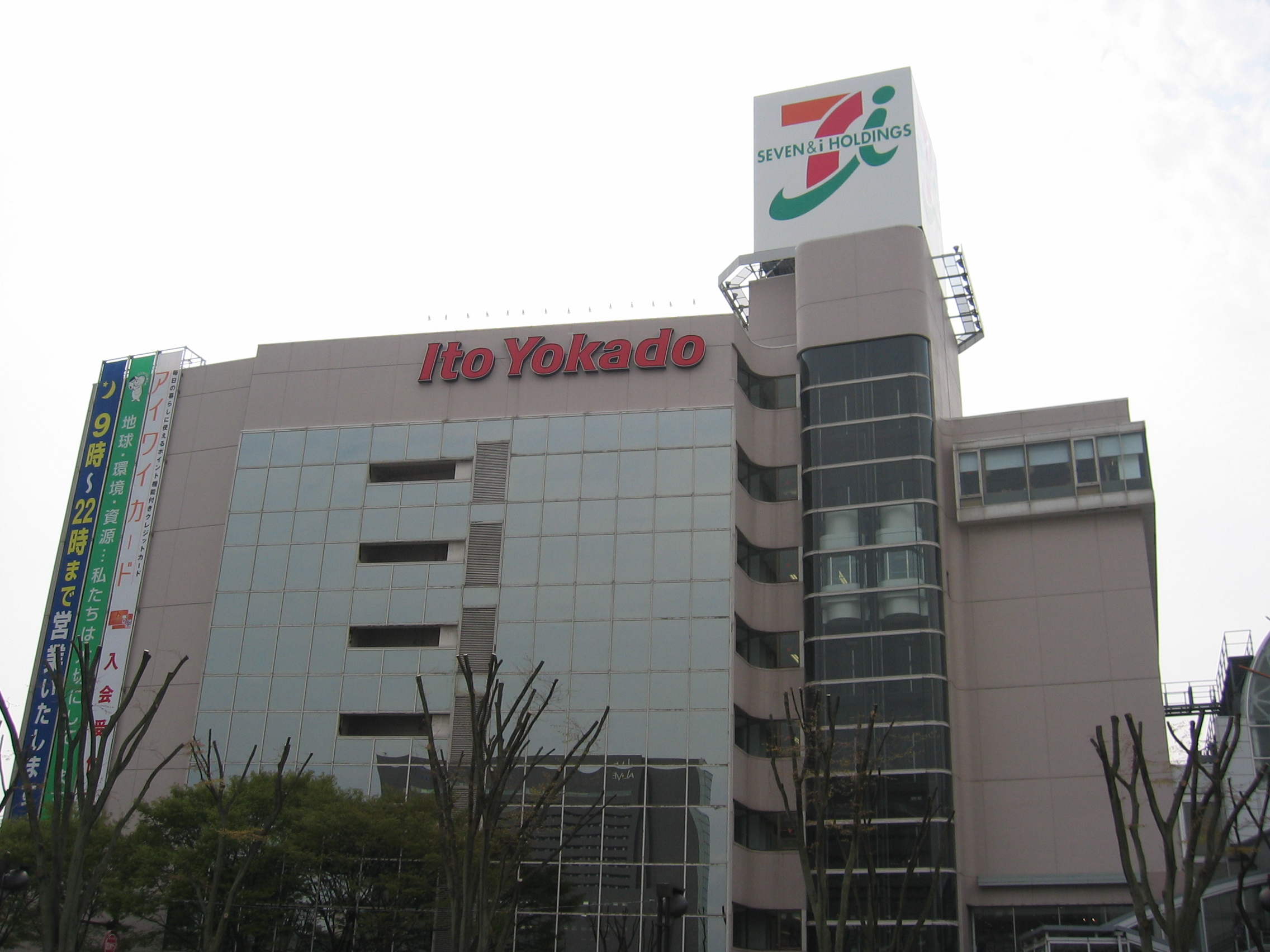 イトーヨーカドー秋田店(Ito-Yokado Co.,Ltd AKITA BRANCH, JAPON)